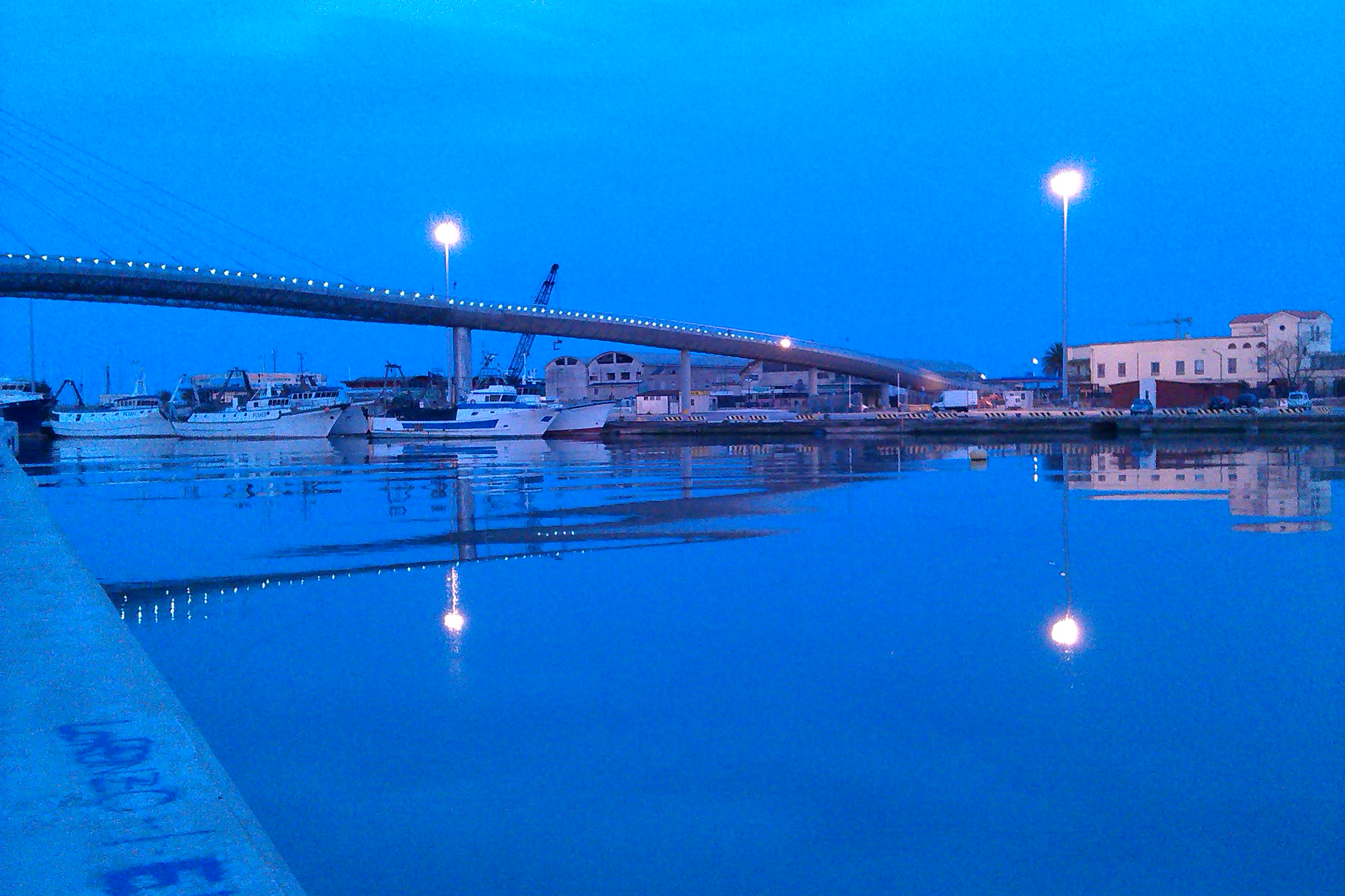 Porto di Pescara